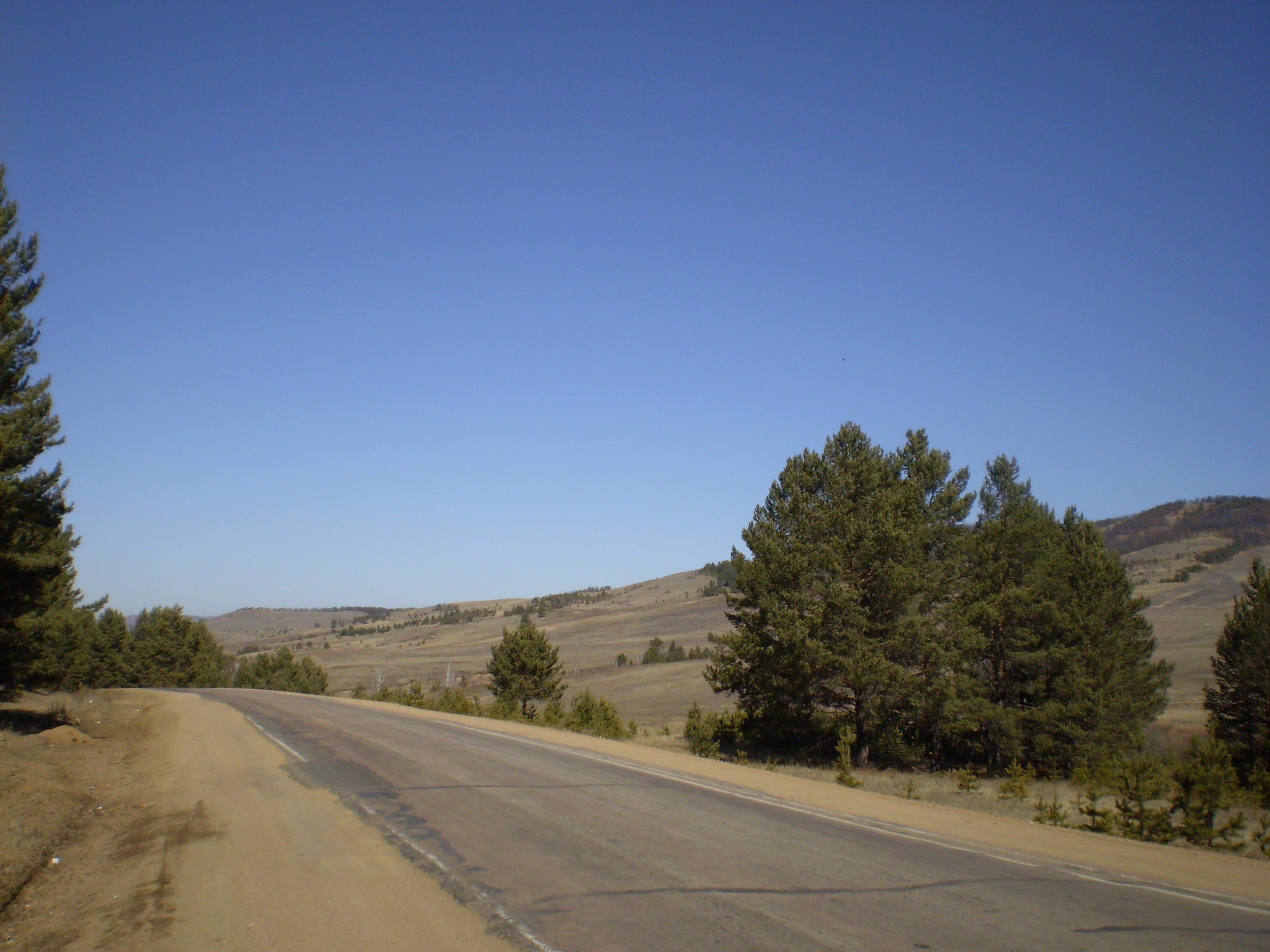 Тарбагатайский район Бурятии